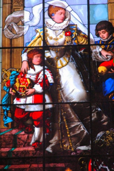 фотография витража с изображением Катарины Монсдоттер и сыновей в кафедральном соборе Турку